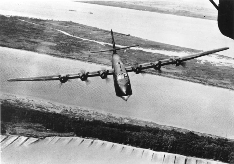 BV 222 "Wiking" - neues deutsches Großflugboot Das neue deutsche Großraumflugboot der Blohm und Voss Werke BV 222 "Wiking", ist derzeit das größte Flugboot der deutschen Luftwaffe. Das zweistöckige Boot ist 37 Meter lang und 5,6 Meter hoch, die Spannweite der Tragflächen beträgt 46 Meter. Die sechs Motoren arbeiten mit einer Stärke von 7000 PS und geben ihm eine hohe Geschwindigkeit und große Reichweite. Starke Bewaffnung an Kanonen und Maschinengewehren gewährleisten ihre Sicherheit und Luftüberlegenheit bei feindlichen Luftangriffen. S6355